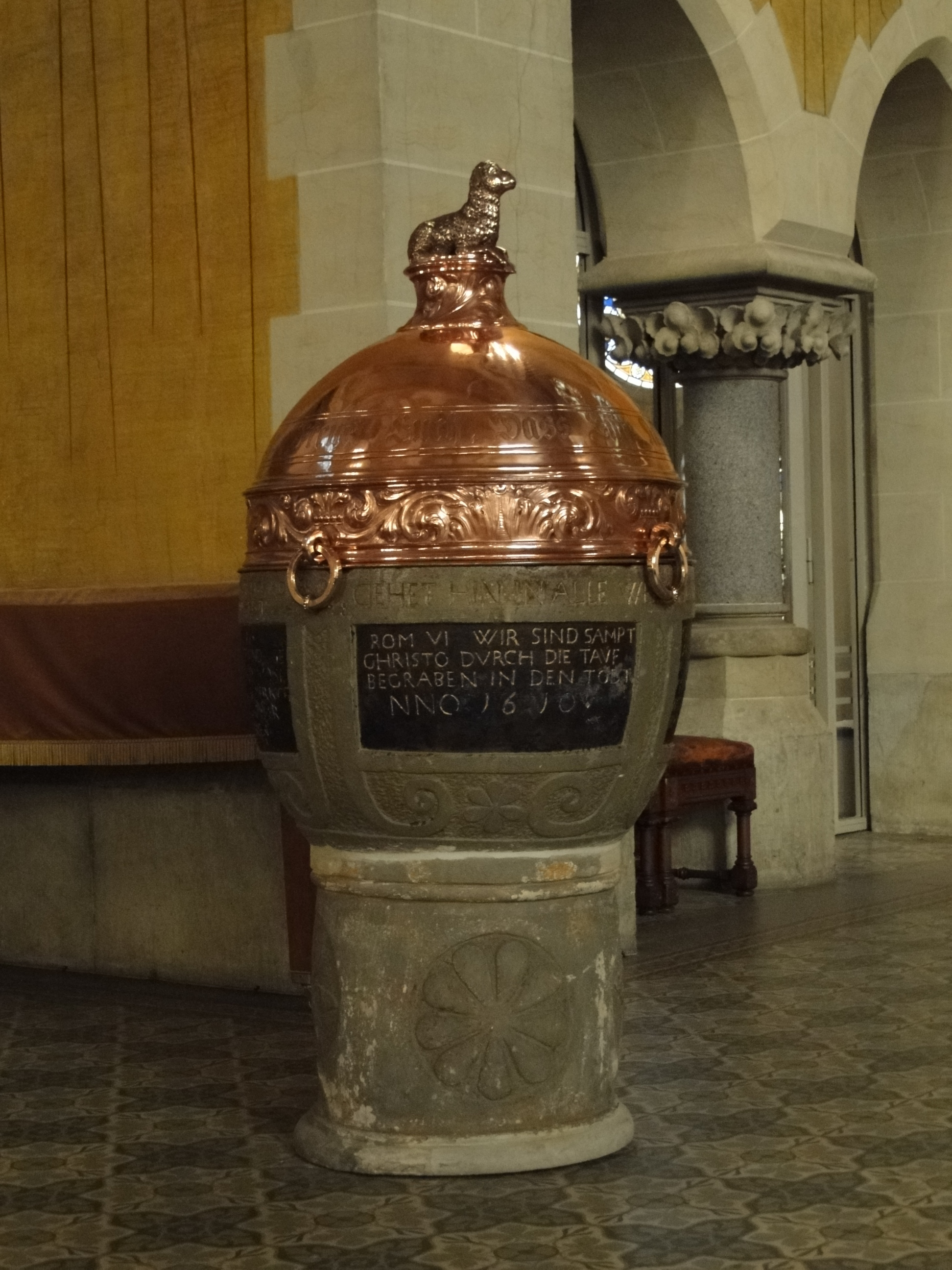 Taufstein der alten Kirche Leuben, heute in der Himmelfahrtskirche aufgestellt